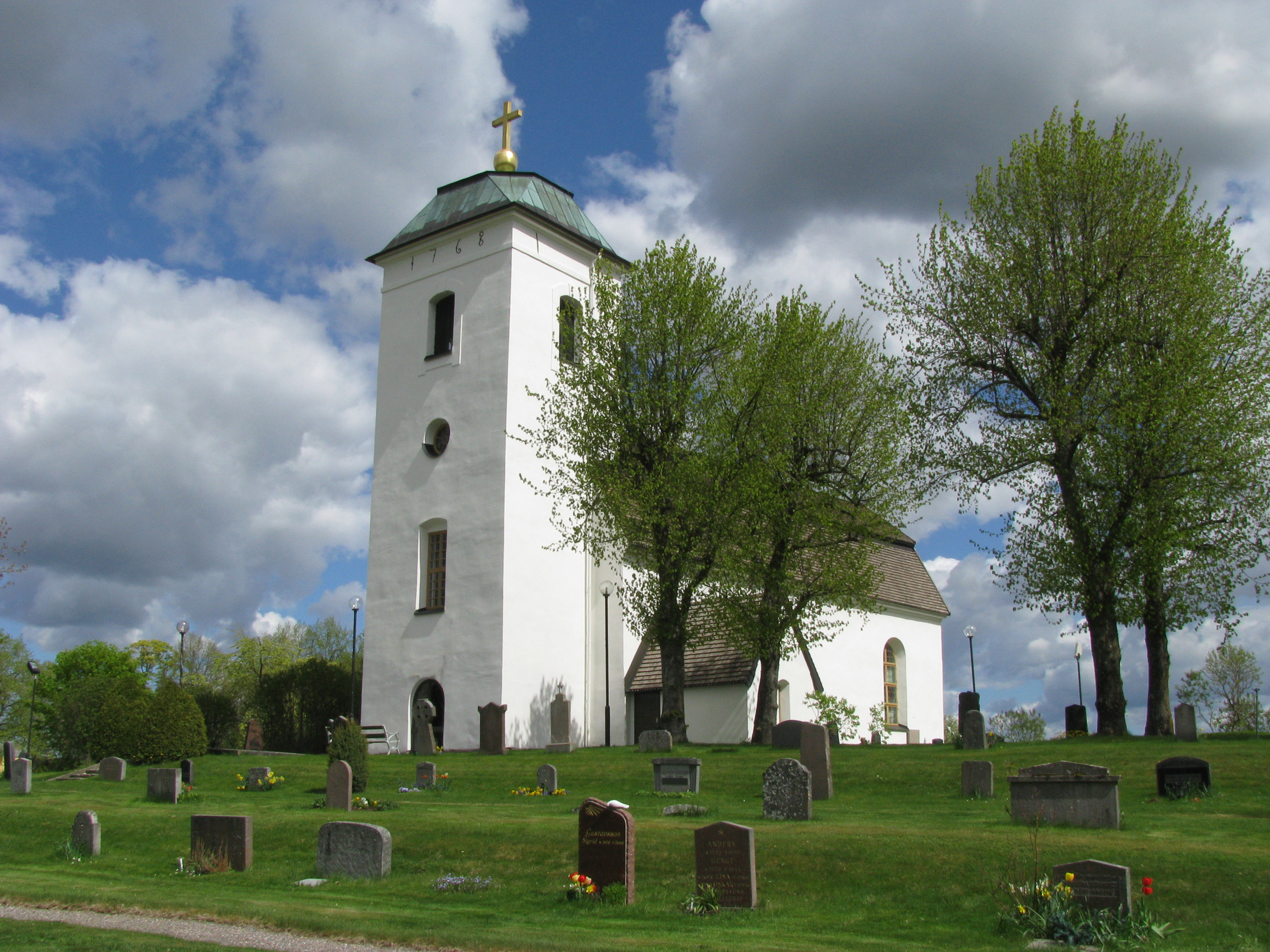 Eds kyrka i Upplands Väsby